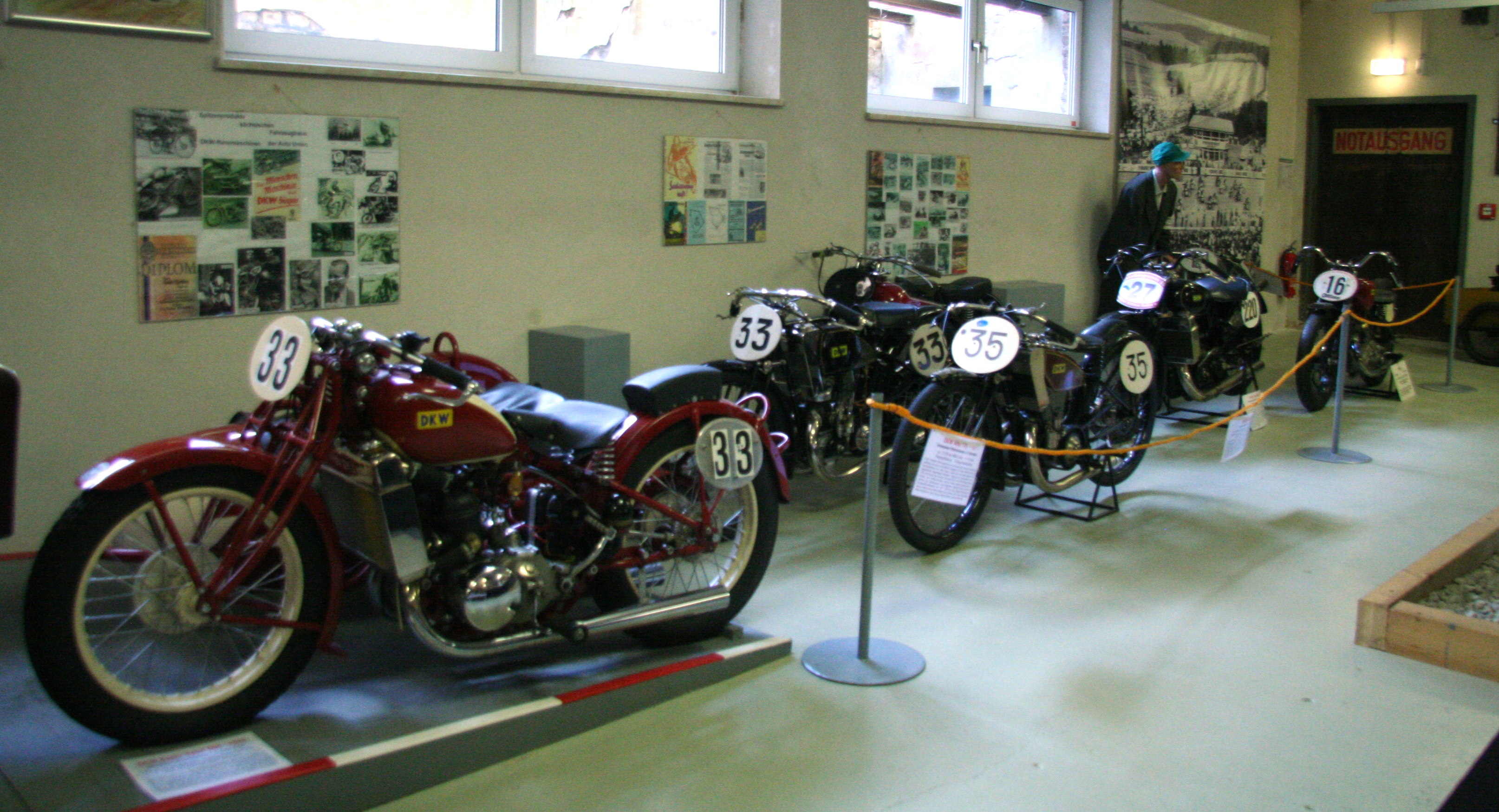 DKW Motorradsportabteilung im Museum für sächsische Fahrzeuge in Chemnitz.